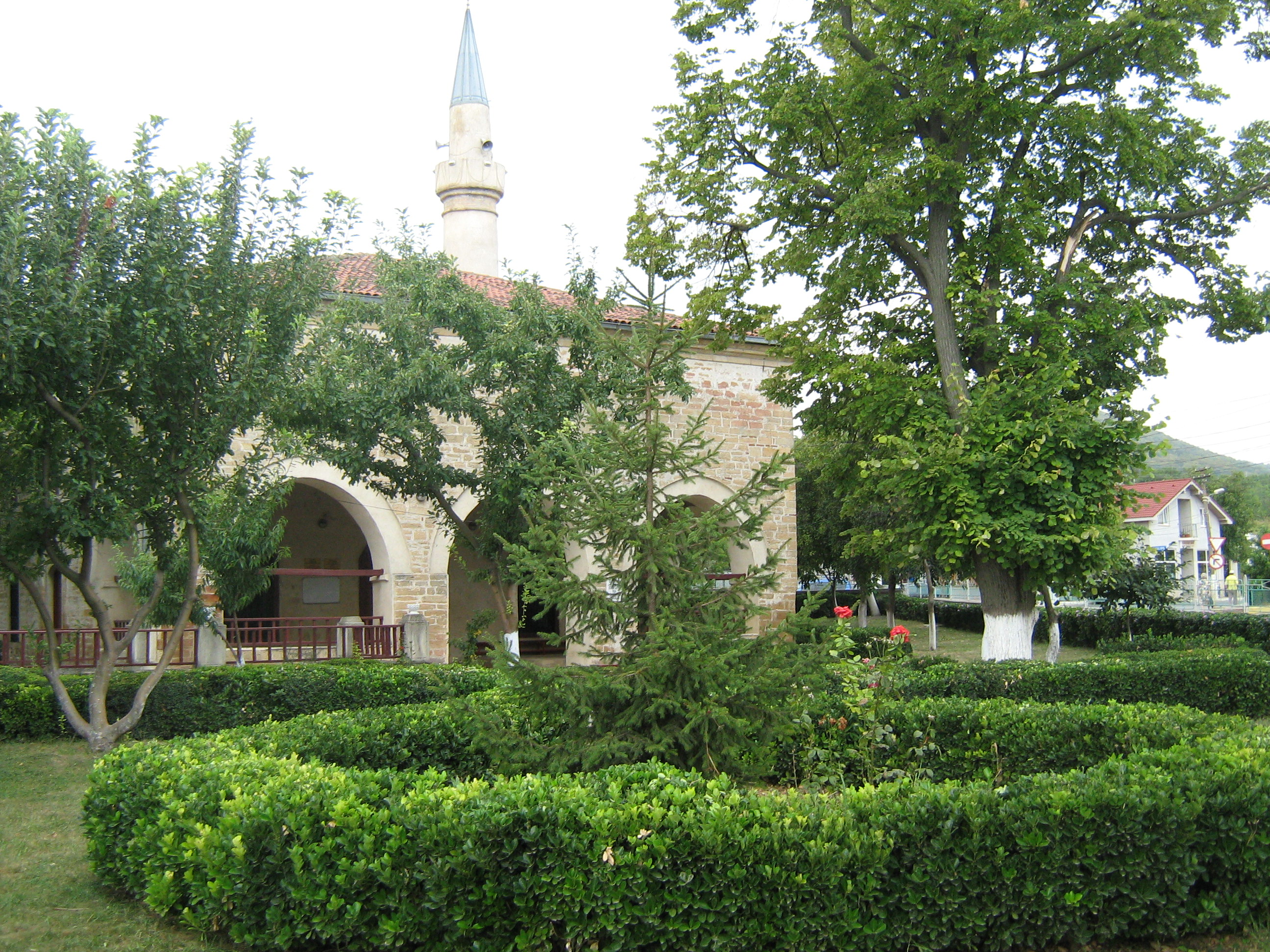 Geamia Ali - Gazi Pașa